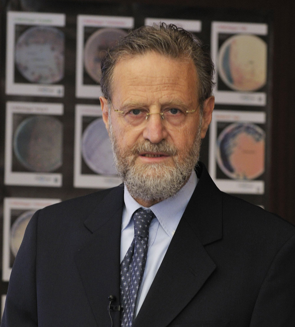 Dr. Alain Rambach devant un poster illustrant des boites de Petri contenant les milieux chromogènes développés par la société CHROMagar